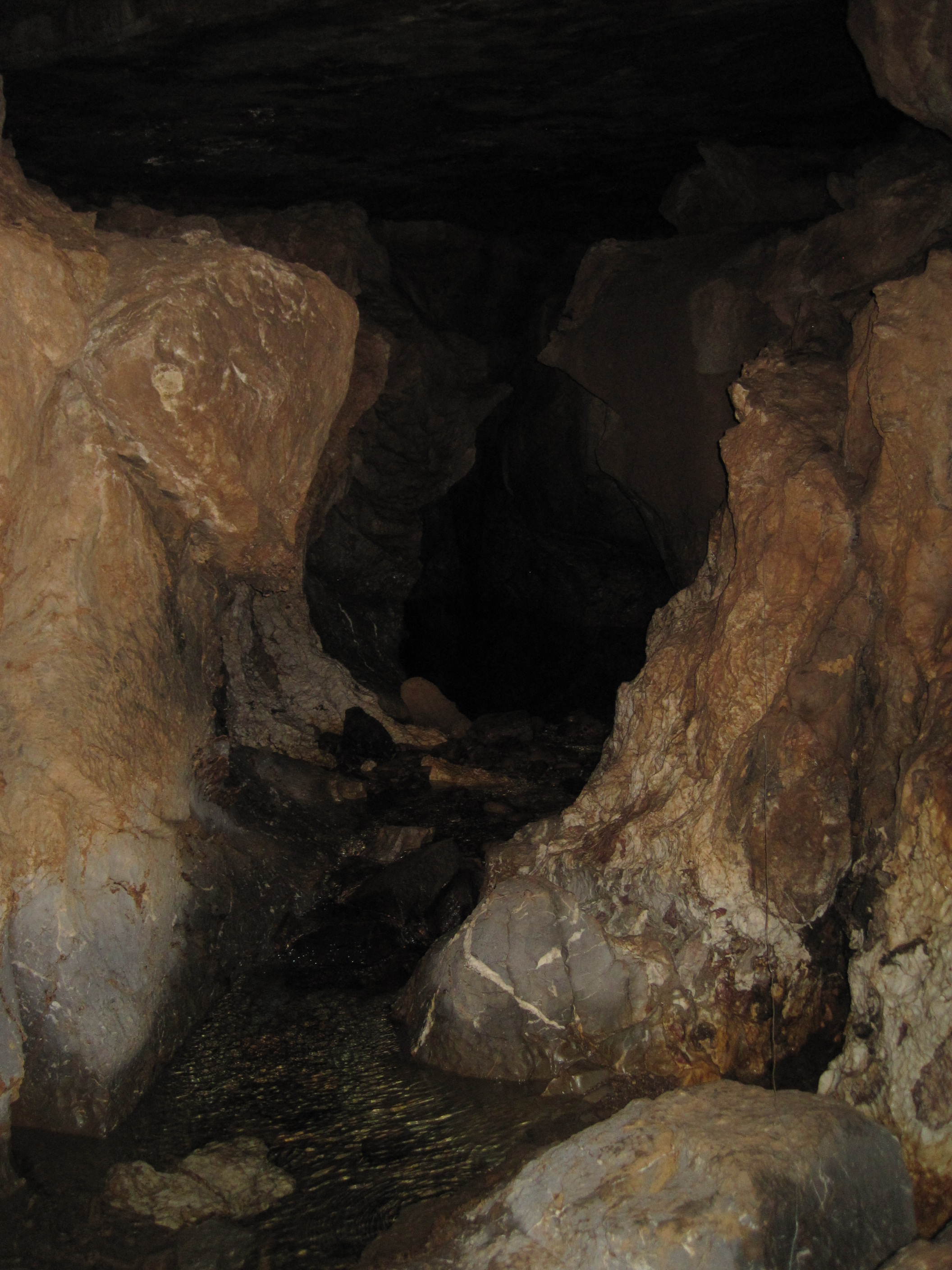 Interior de la cueva del Cobre, al norte de la provincia de Palencia (España).